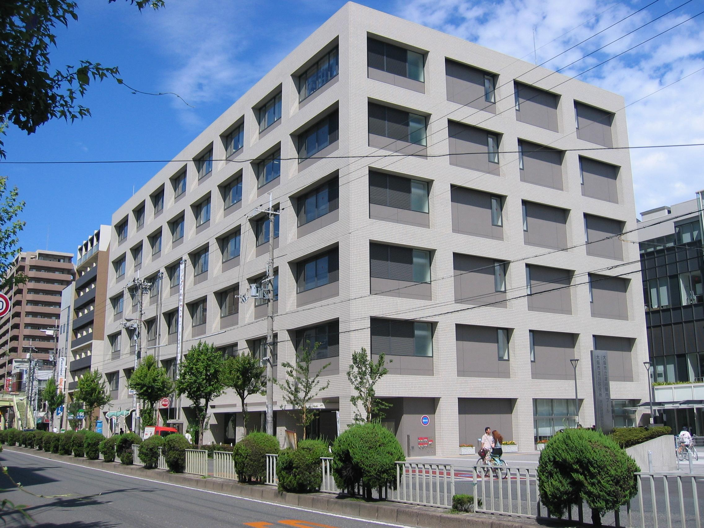 淀川区役所